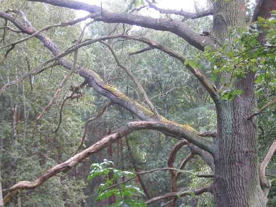 Totholz in Brandenburg Naturpark Nuthe-Nieplitz, Weg Dobbrikow-Wittbrietzen Selbst fotografiert, August 2004